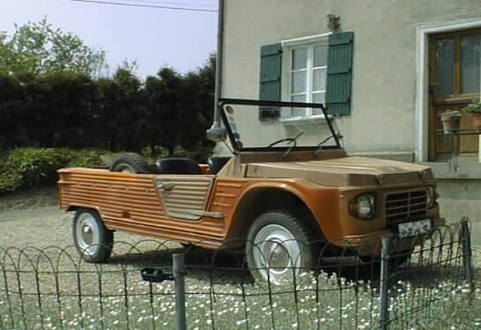 photo de ma Citroën Mehari.